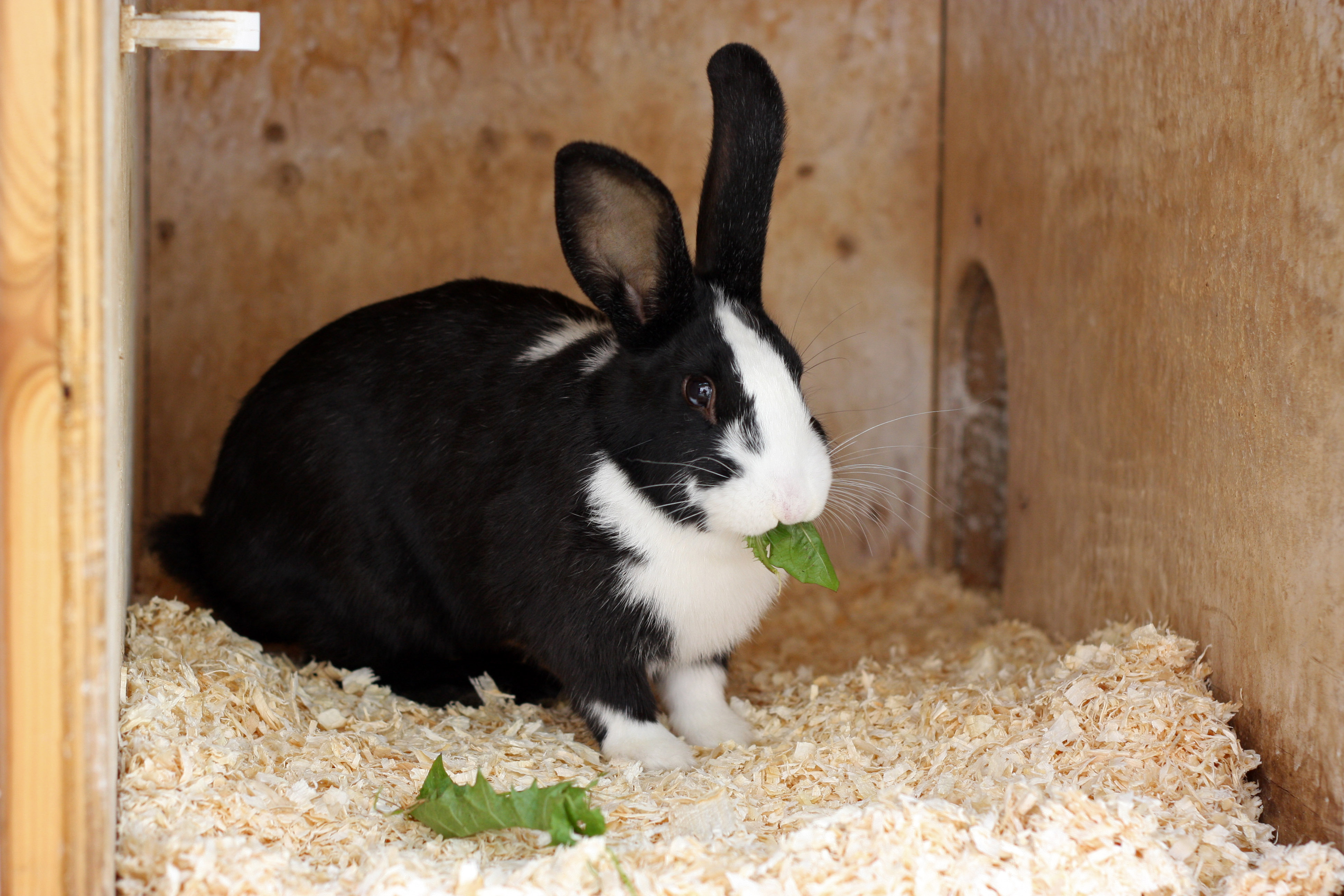 Young Mellerud rabbit (Mellerudskanin)